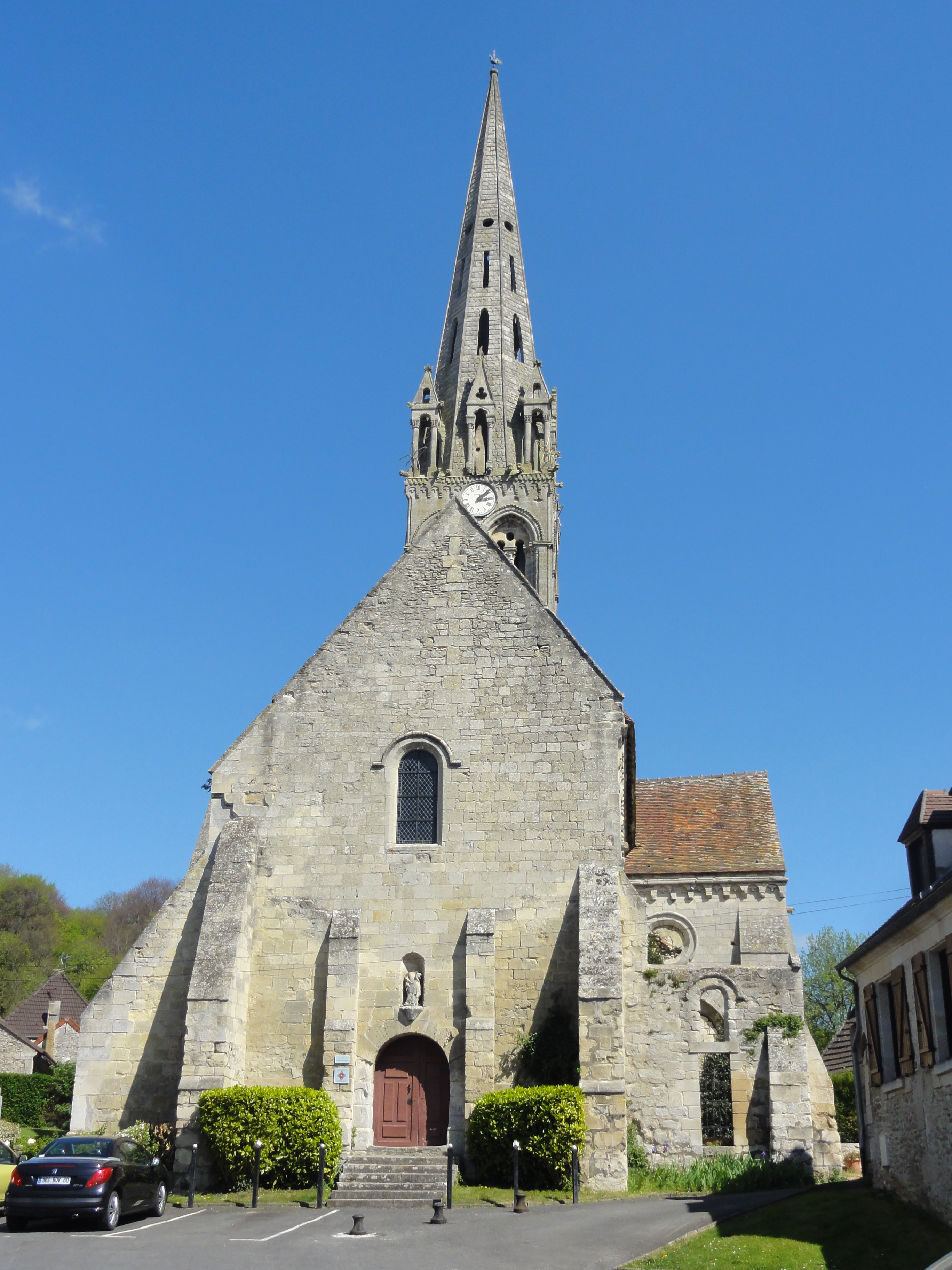 Vue générale depuis l'ouest.